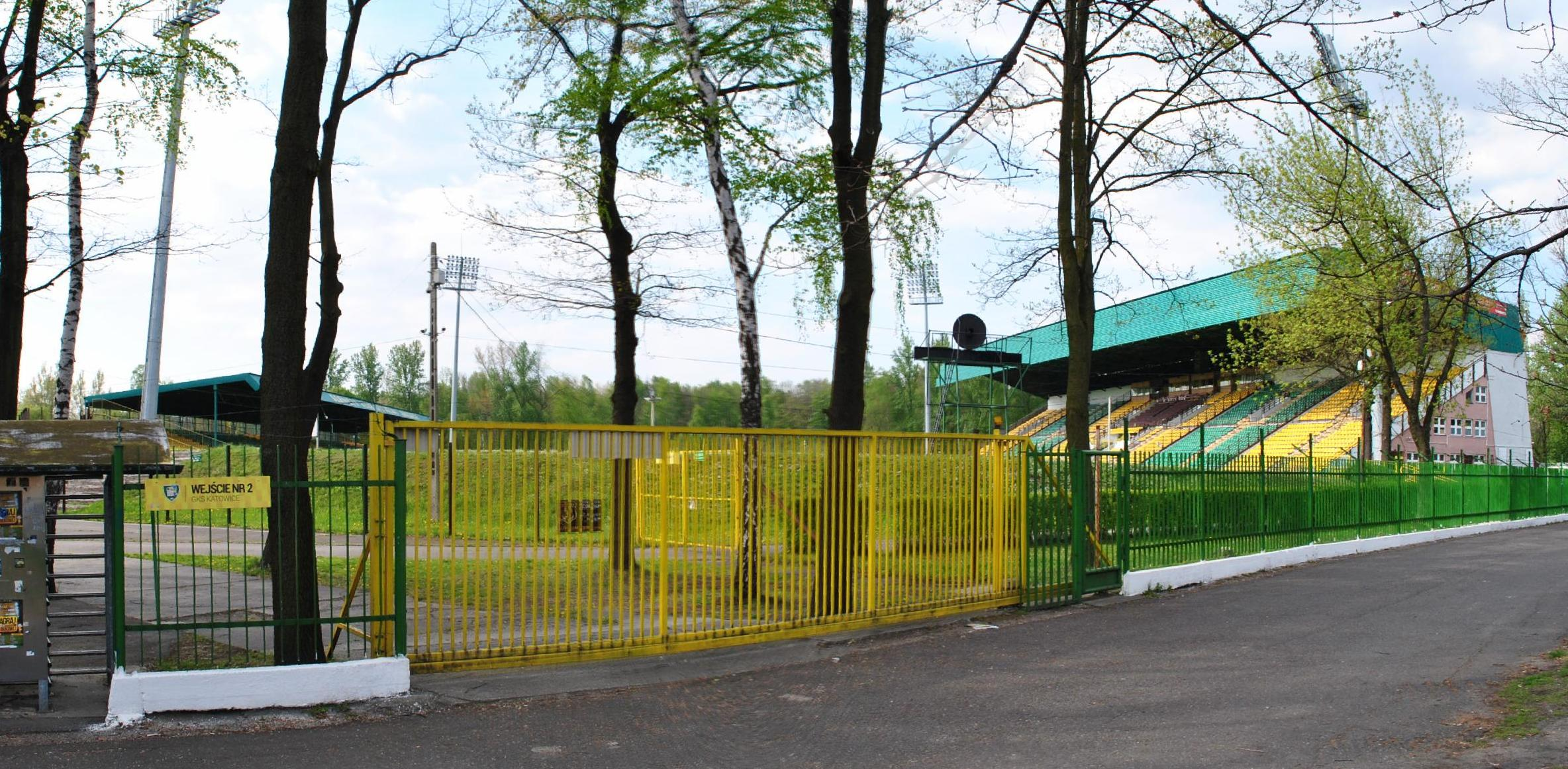 Stadion GKS Katowice przy ul. Bukowej